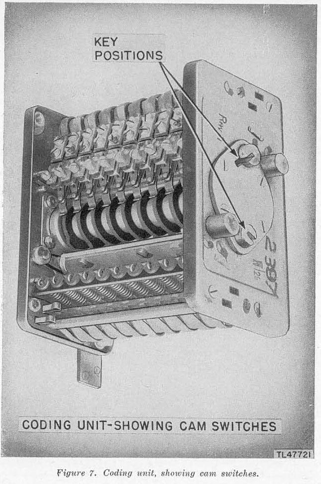 FuG-25a "Erstling" Codegeber. Nockenschaltwerk mit Aufnahme für 2 Codierschlüssel